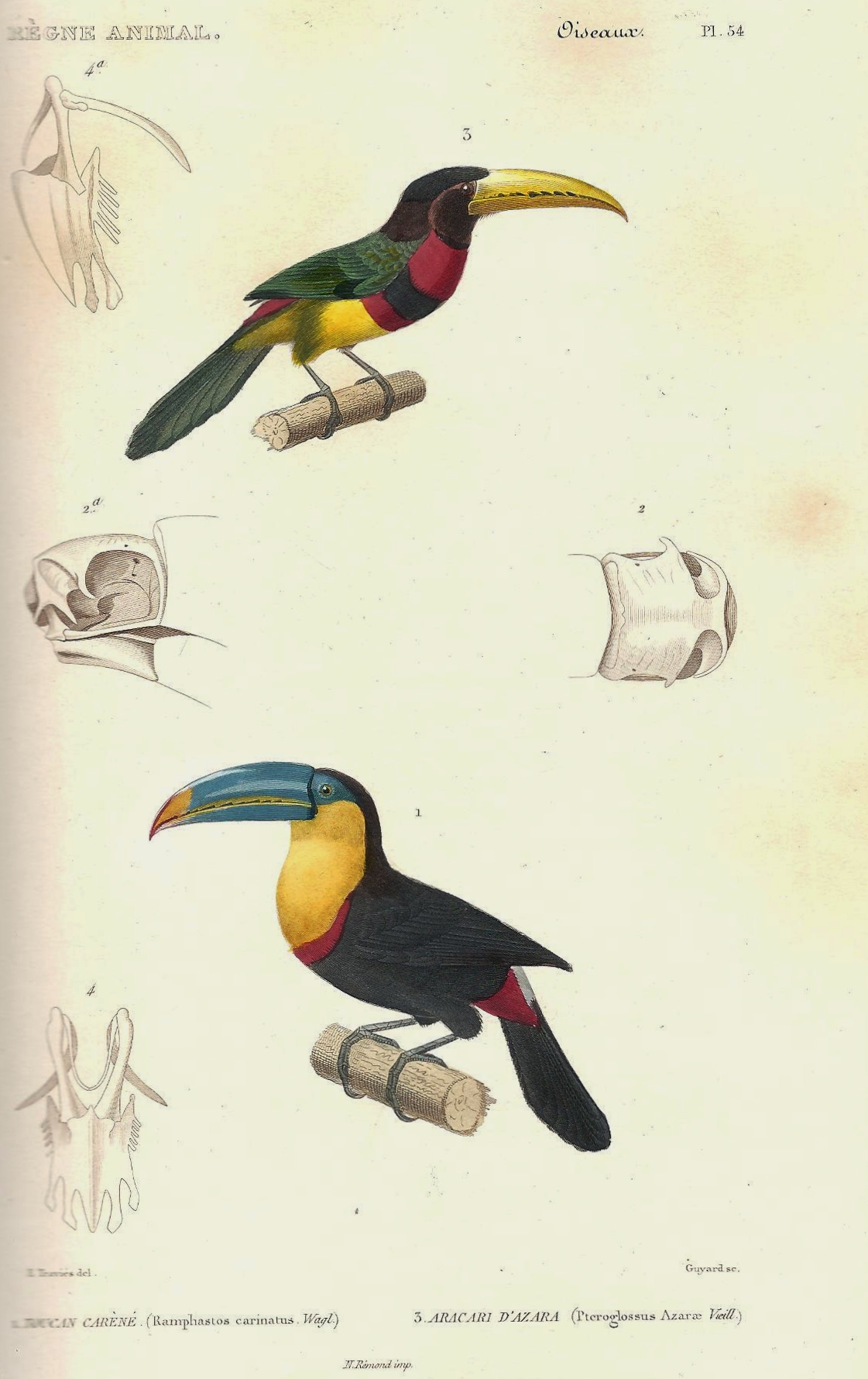 Planche N°54 dessinée par Edouard Traviés provenant du livre "Le règne animal distribué d'après son organisation" par Georges Cuvier (Tome 4), seconde édition de 1828, représentant : -en haut : Araçari d'Azara (Pteroglossus azara) -en bas : Toucan à carène (Ramphastos sulfuratus)